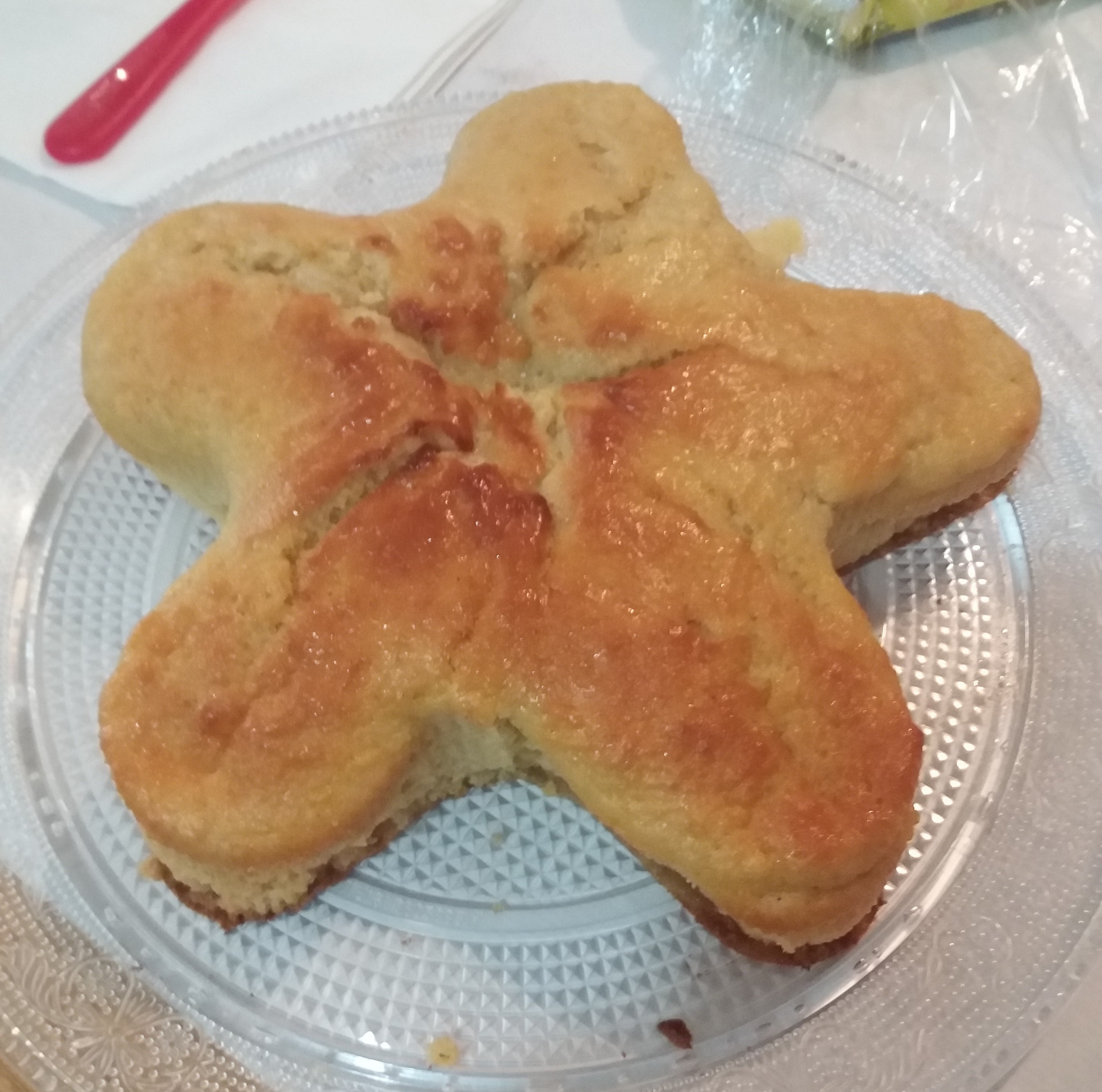 Postre típico venezolano